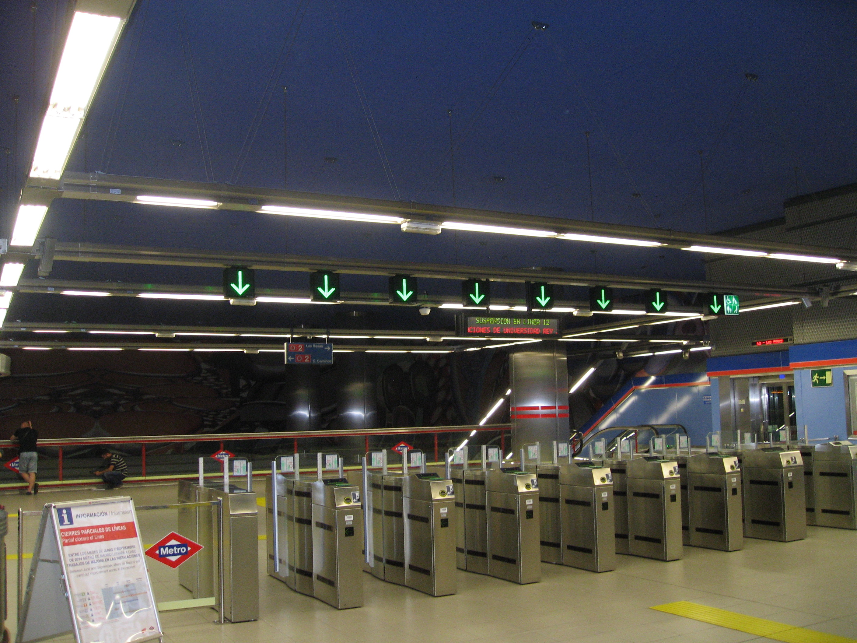 Vista del vestíbulo de la estación de Alsacia